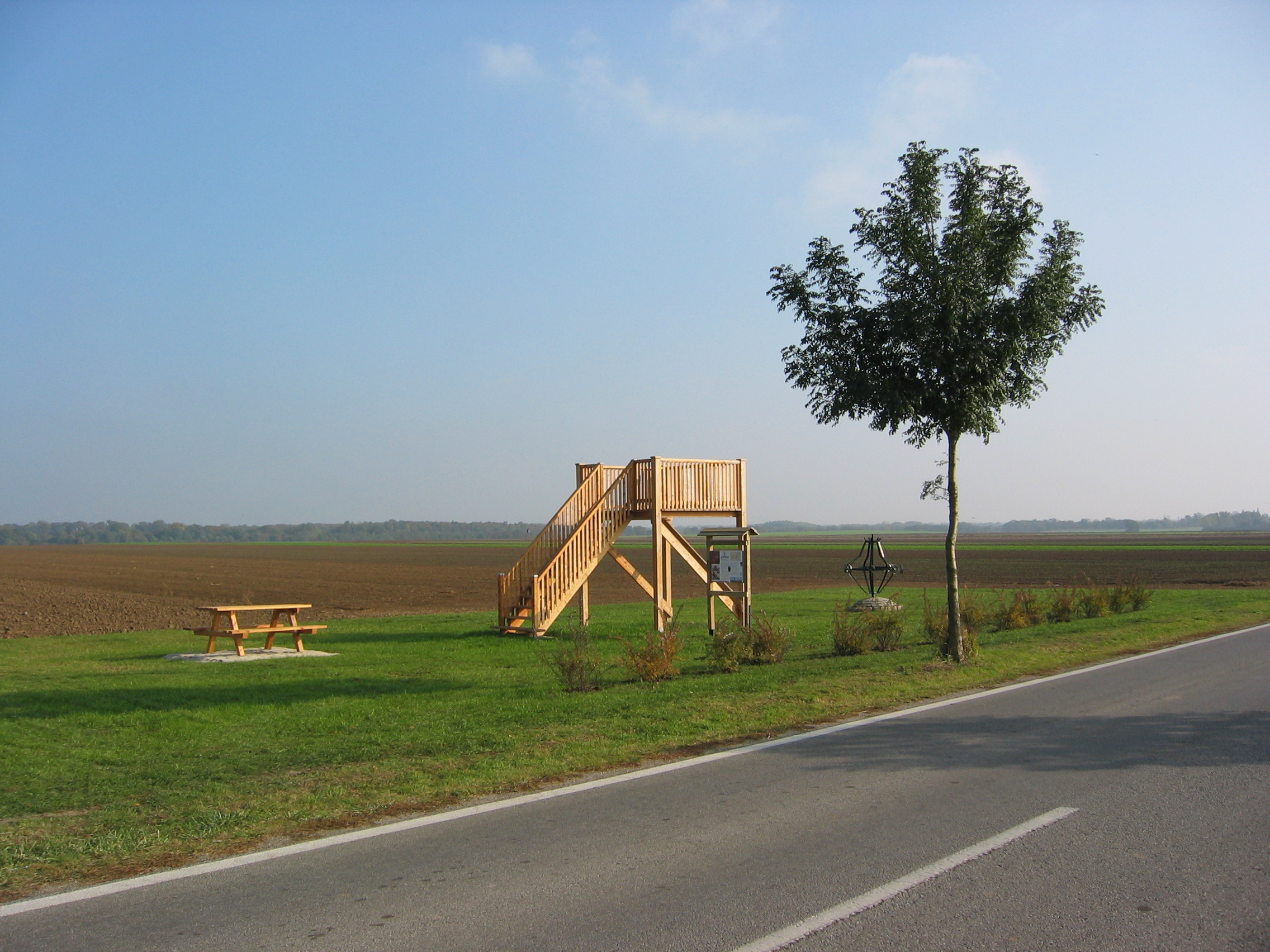 Tumuliwarte, Bernhardsthal, errichtet 2005 an der B49